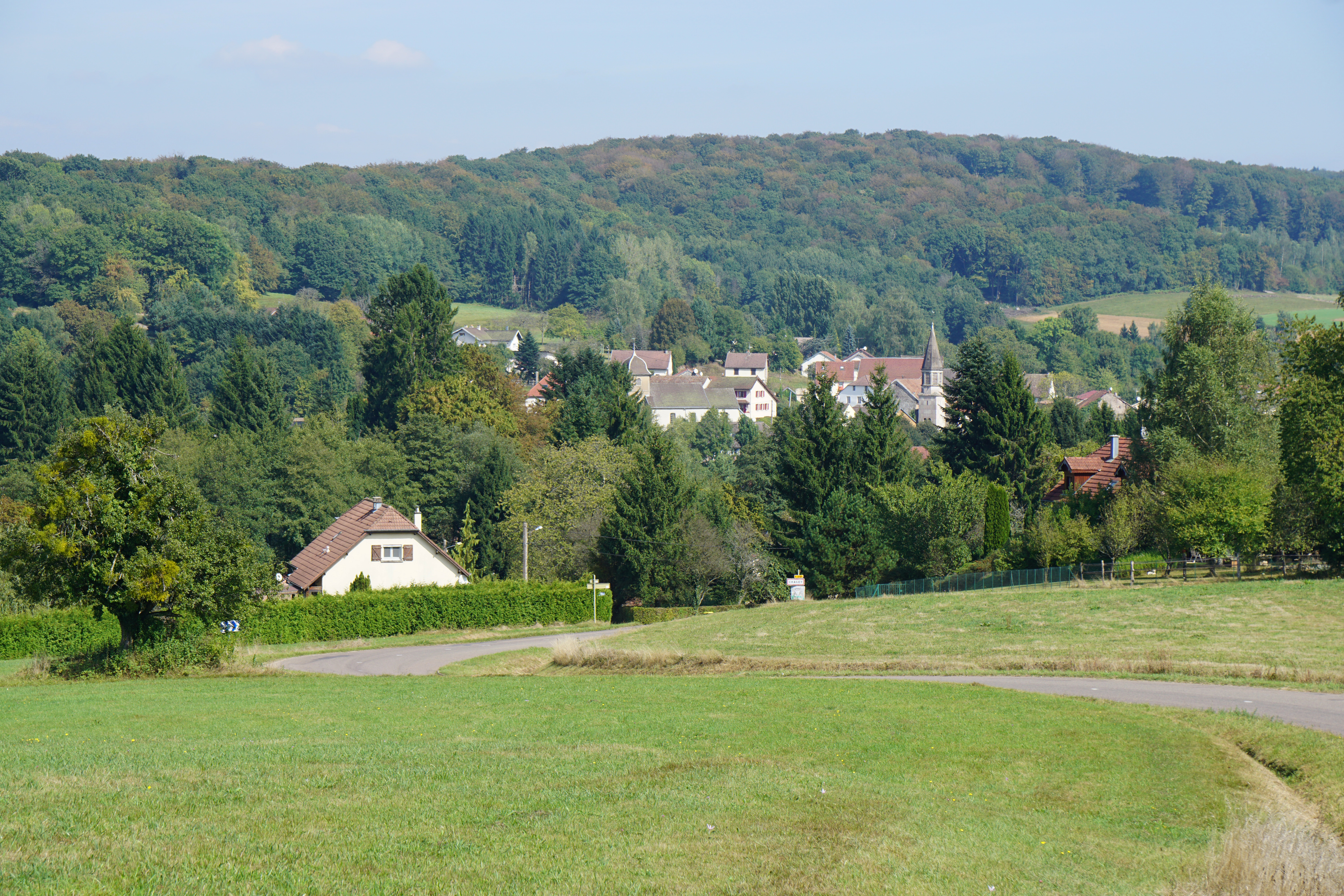 Chagey.